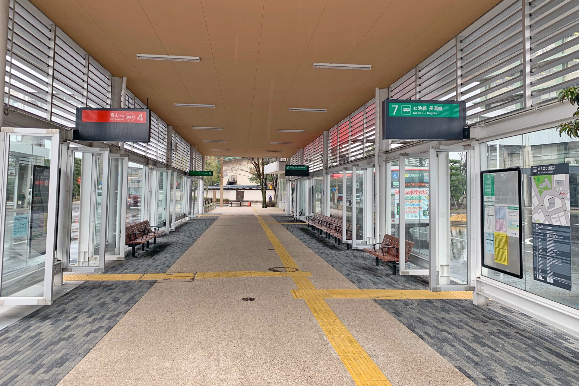 萬代橋ライン市役所前乗り換え拠点（2019年3月）。 2015年の開業に伴って新たに整備された。